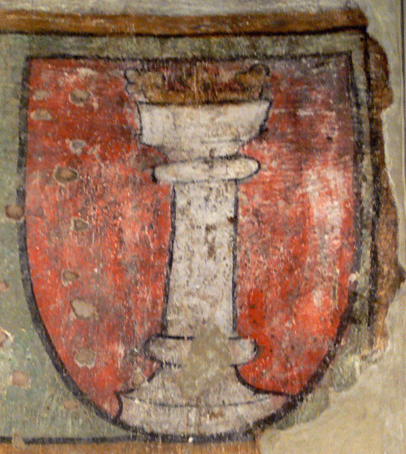 Museum Humpisquartier, Ravensburg So genanntes „Mohrenfresko“ aus dem Haus Marktstraße 61 (Hauptsitz der Großen Ravensburger Handelsgesellschaft, später „Gasthaus Mohren“), 15. Jahrhundert, mit Darstellung von Wappen der Stände des Hl. Römischen Reichs, darunter adlige Turnierszene (davon nur die Köpfe mit Helmzier erhalten) mit Zuschauerinnen Detail: Wappen des Papsts Martin V. (Colonna), Papst 1417–1431 Museum Humpis-Quartier Native nameMuseum Humpis-QuartierLocationRavensburg, GermanyCoordinates47° 46′ 50″ N, 9° 36′ 56″ E Established2009Website control : Q1637298 VIAF: 128828875 LCCN: nb2007020847 GND: 4565586-8 WorldCat